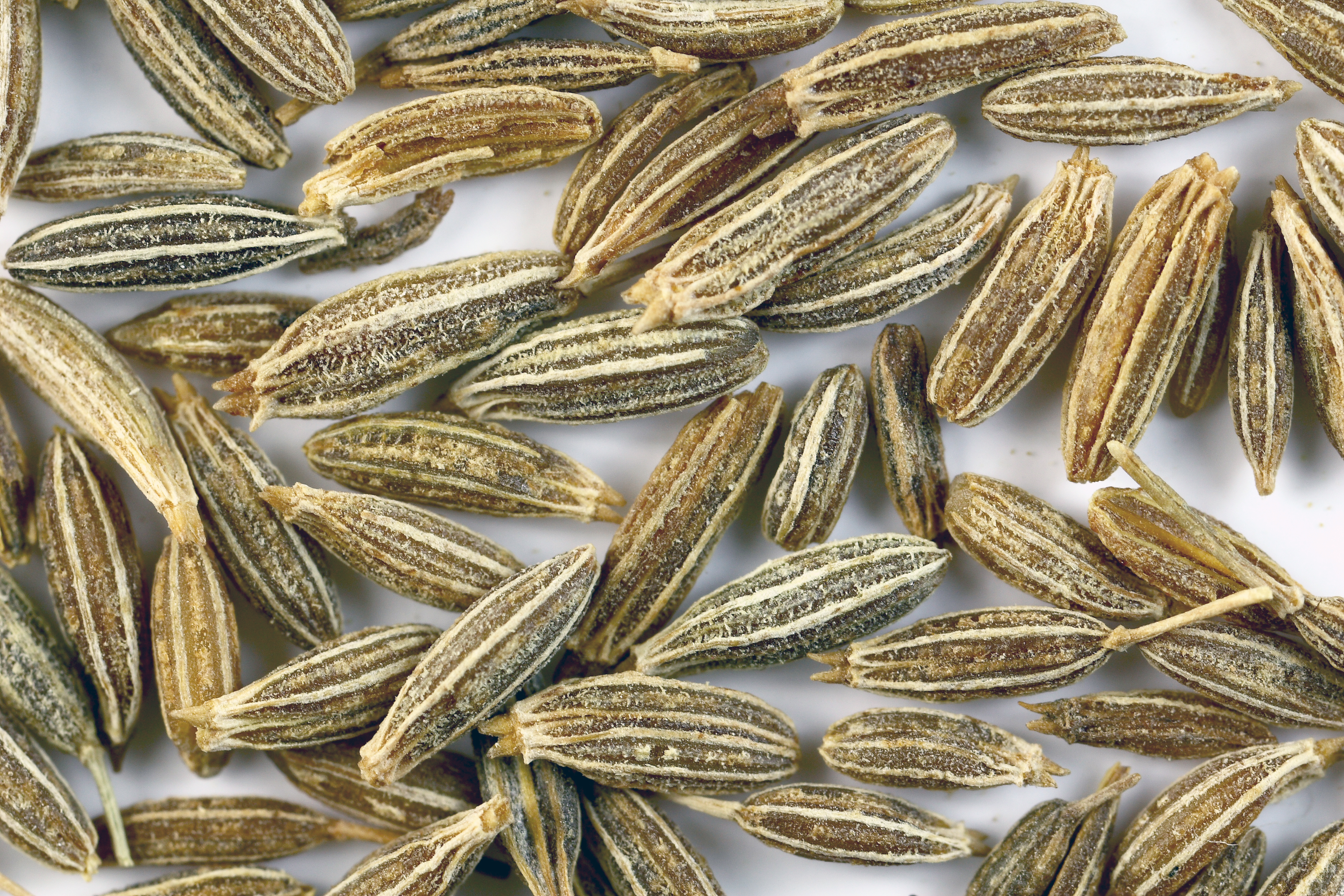 Close-up picture of cumin seeds (Cuminum cyminum). Size about 5 mm.